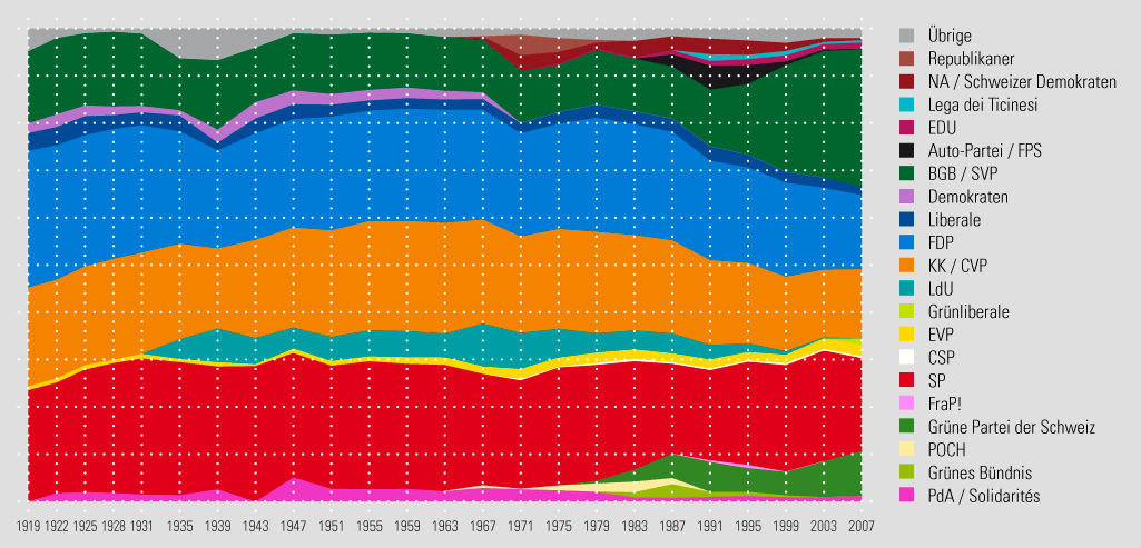 Wähleranteil der Parteien im Schweizer Nationalrat, 1919-2007